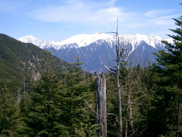 尾高山から南アルプス赤石岳